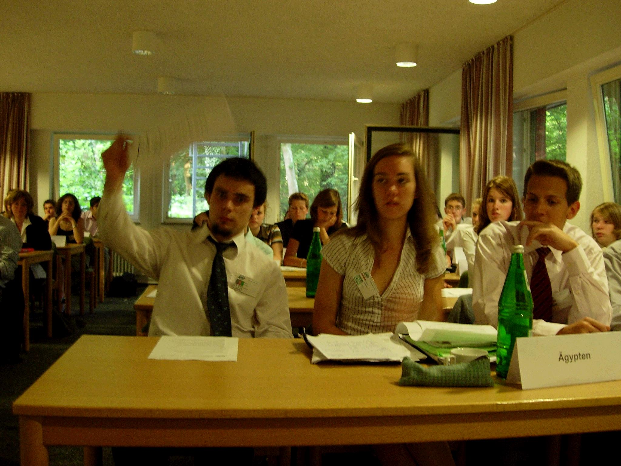 Delegierte im Wirtschafts- und Sozialrat, SPUN 2005